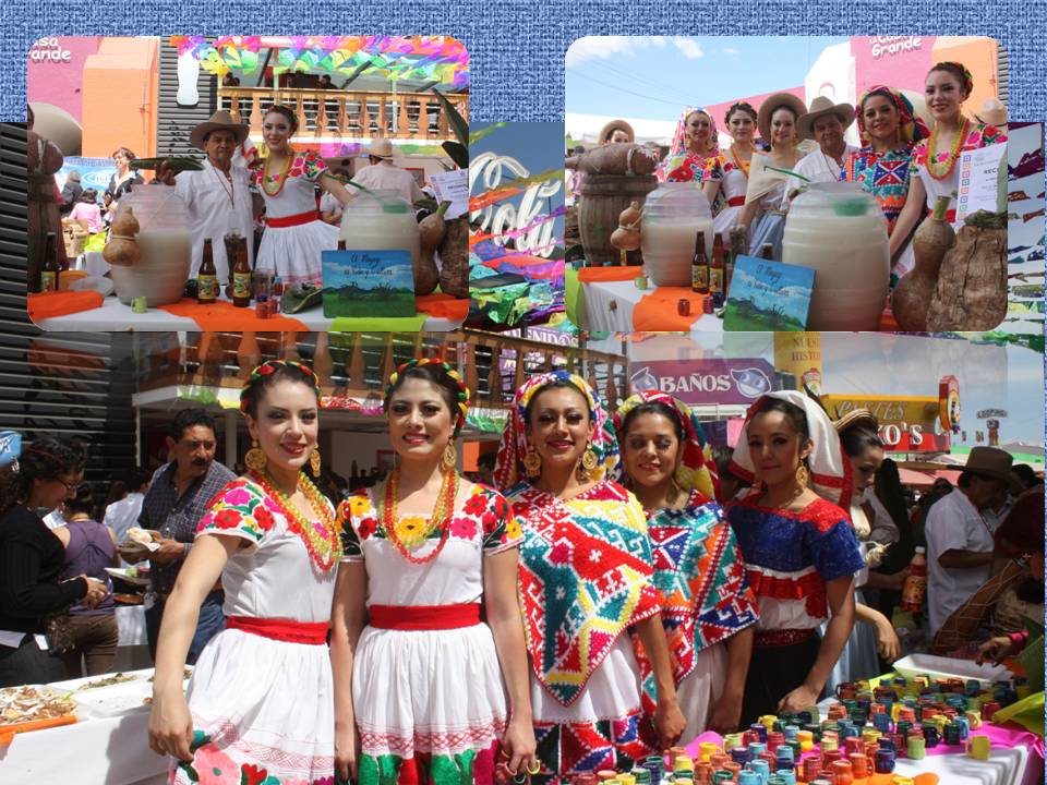 “Crecí en Hidalgo, así que no hay forma de que no esté enamorado de este estado, sus riquezas, tradiciones y eventos”, afirma Gerardo, quien se declara fan de la Feria de Pachuca.